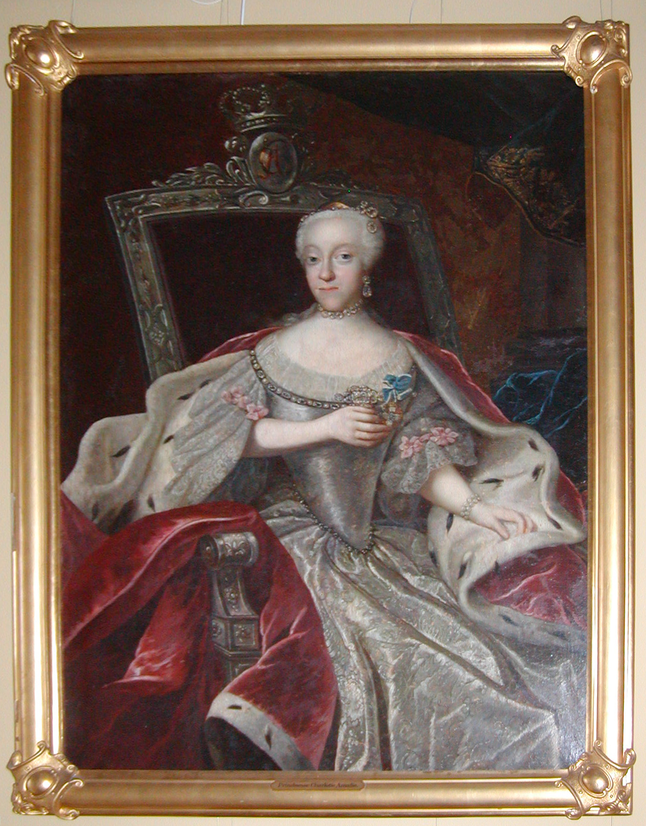 Prinssesse Charlotte Amalie af Danmark (1706-1782)